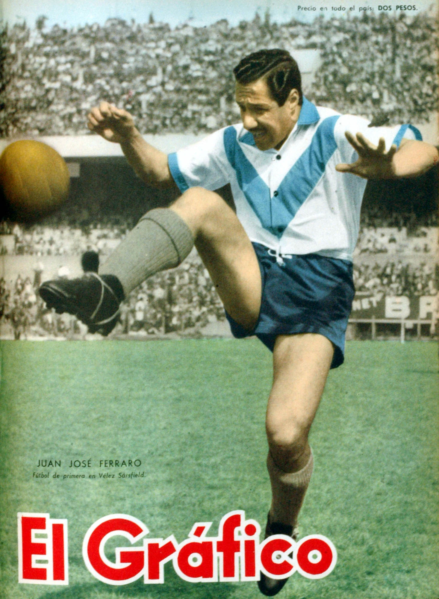 El Gráfico del 18 de Enero de 1957. Edición 1949.